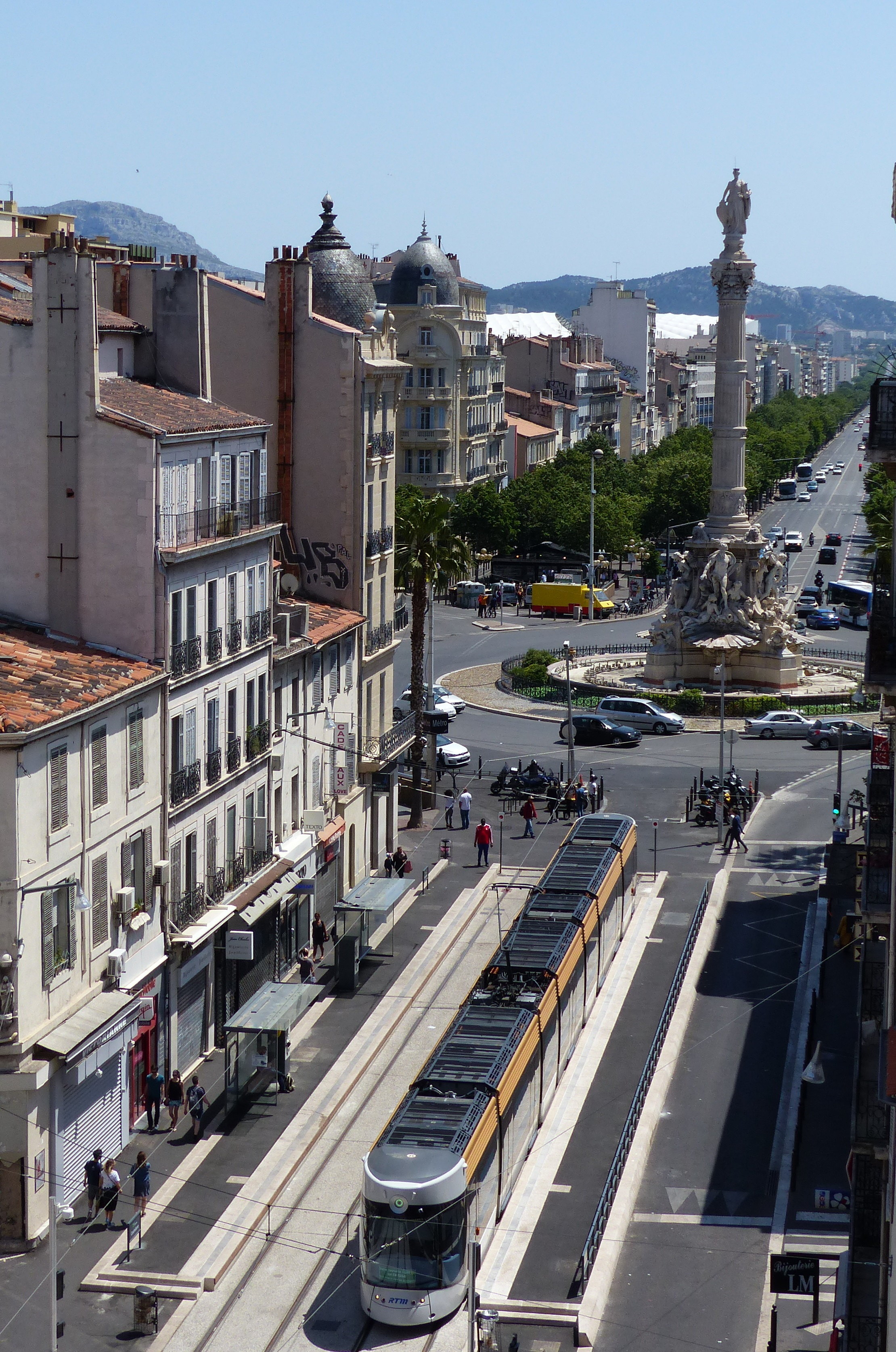 Ligne 3 tramway de Marseille